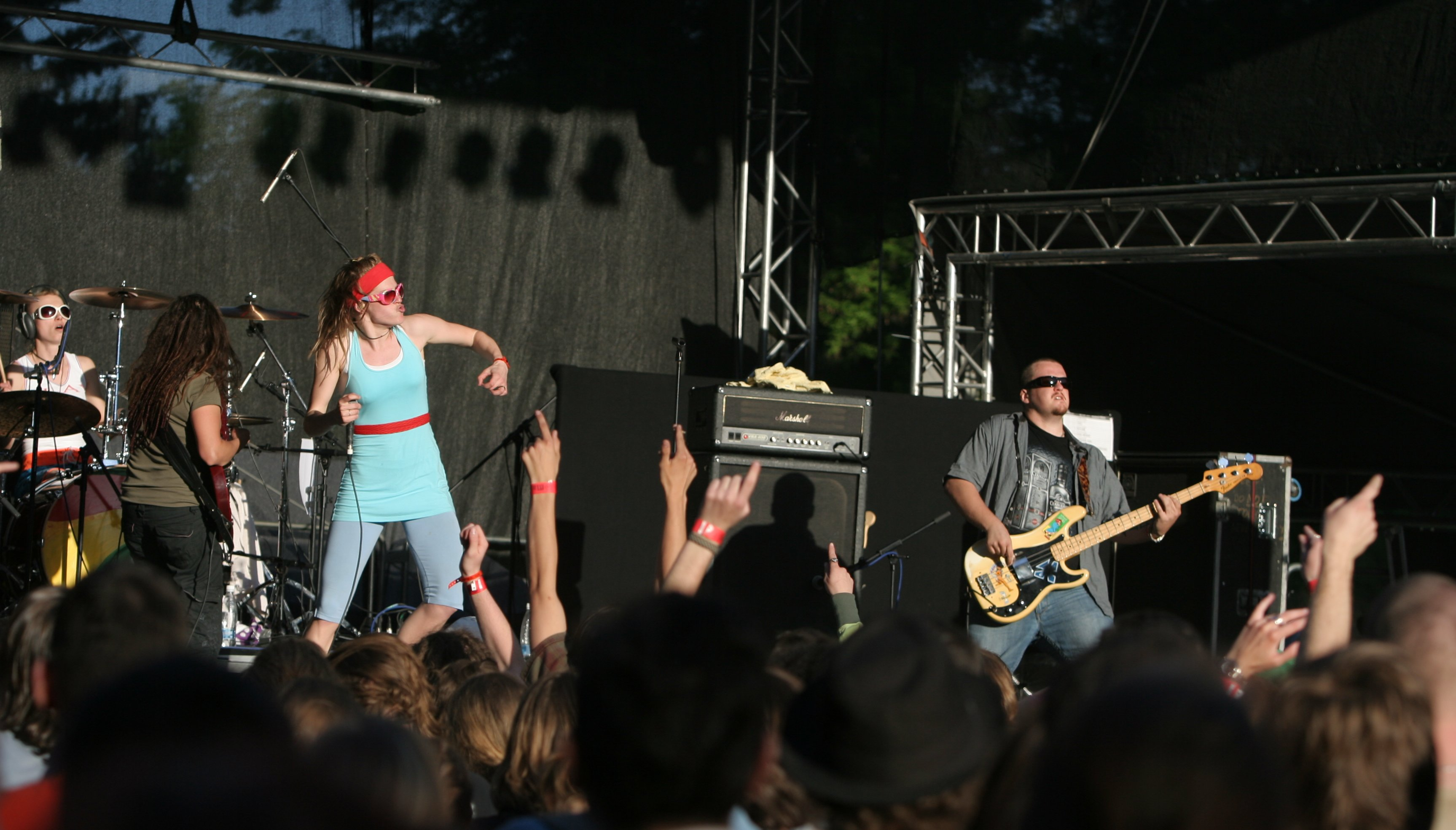 Gaia Mesiah at Prague's Majáles